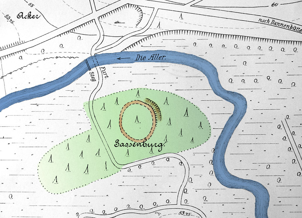 Sassenburg